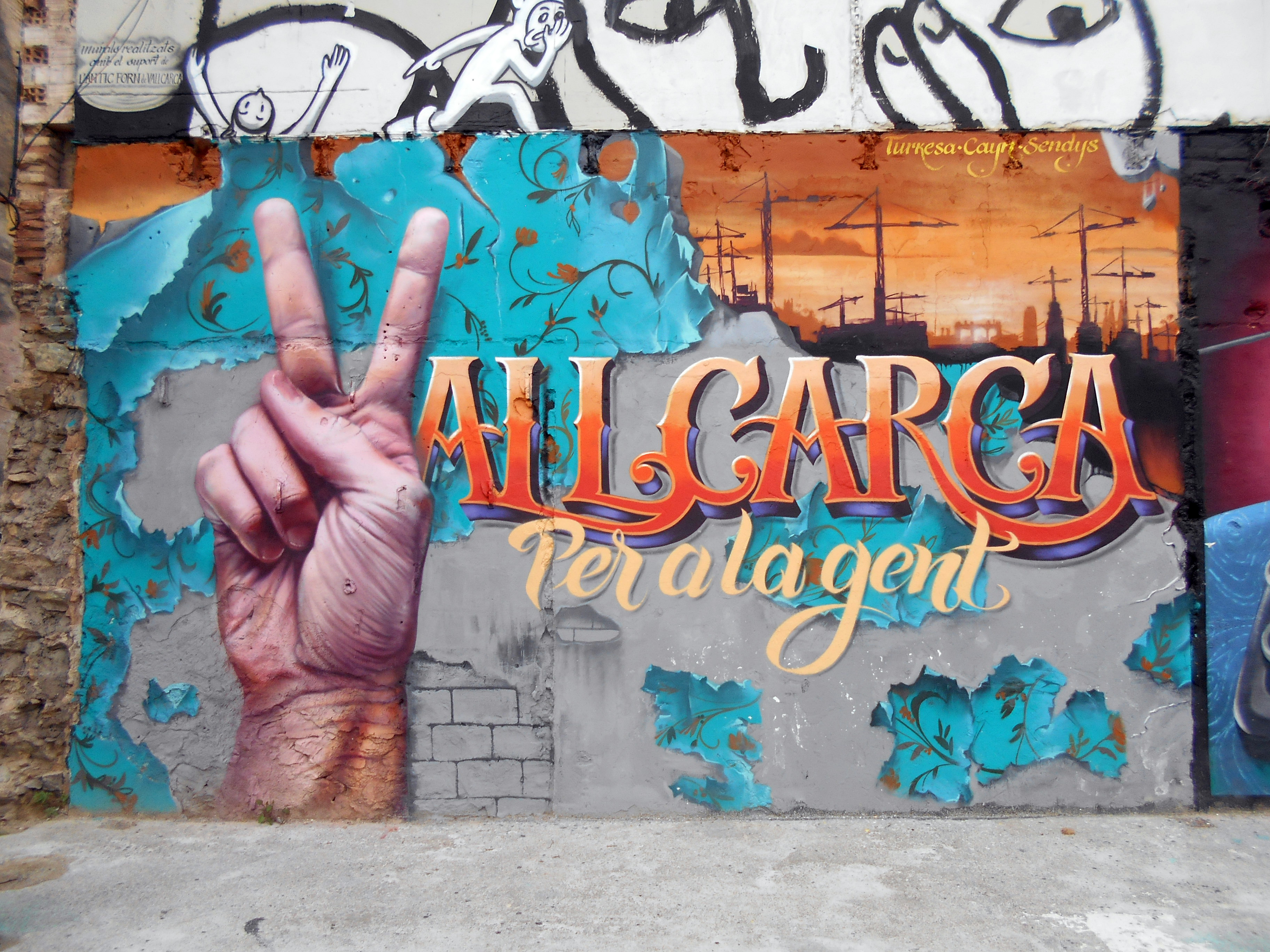 «Vallcarca para la gente», graffiti en Vallcarca.